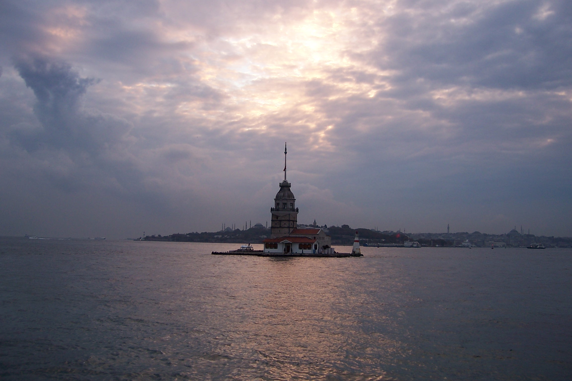 Maiden's Tower taken in Istanbul, Turkey